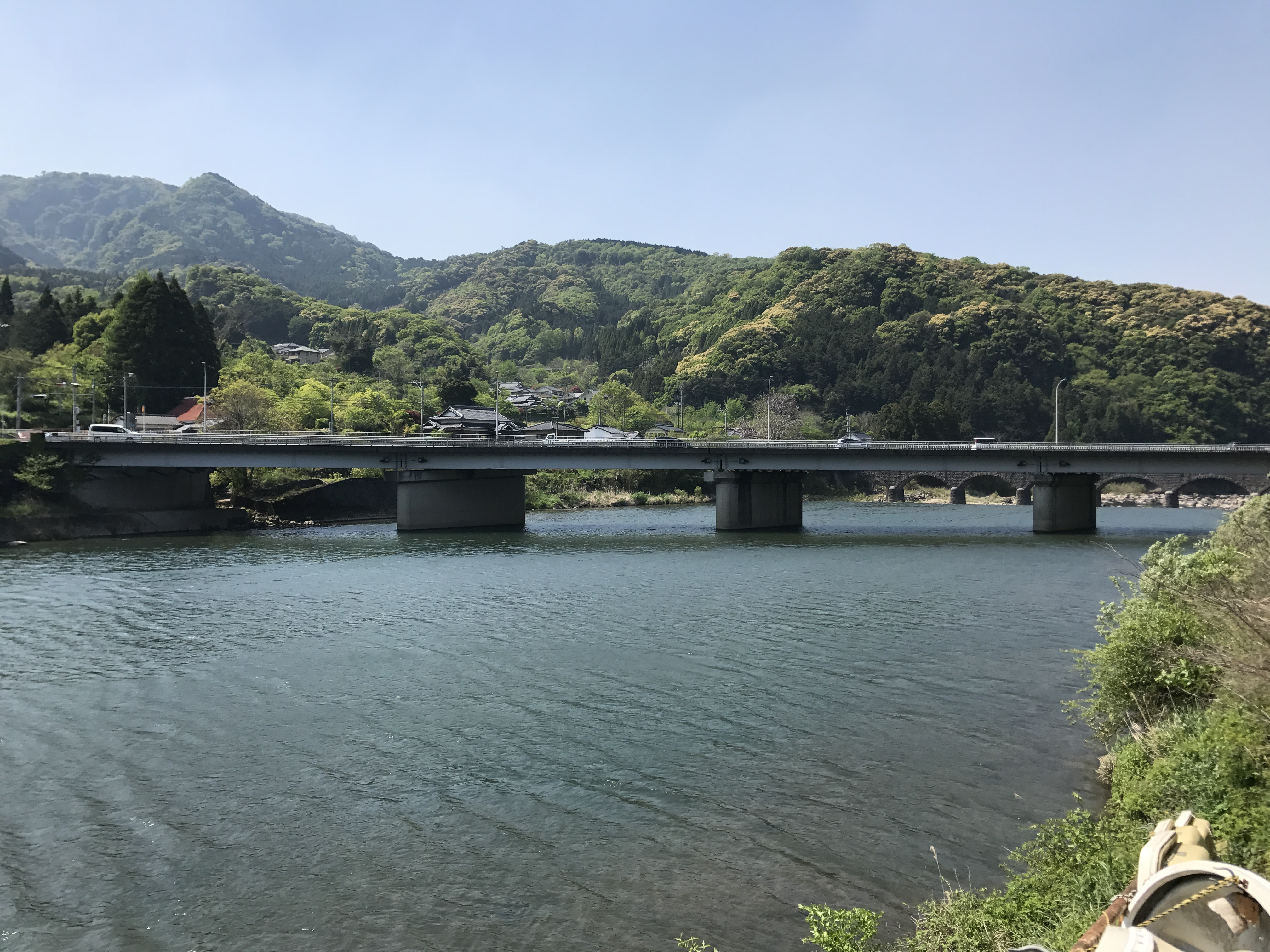 山国川に架かる洞門橋